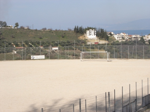 Mintilogli Groud Patra GreeceΔημοτικό γήπεδο Μιντιλογλίου στον Δήμο Βραχνέικων.